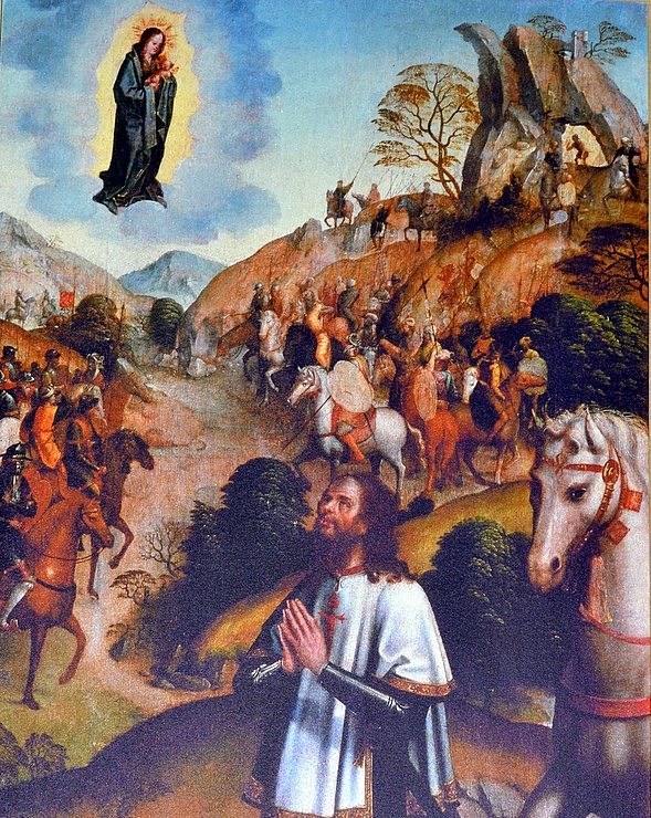 A Aparição da Virgem a um Mestre da Ordem de Santiago é uma pintura a óleo sobre madeira pintada no período de 1520 a 1525 presumivelmente pelo pintor que se designa por Mestre da Lourinhã, mede 129 cms de altura e 83,5 cms de largura, e fazia parte do Políptico da Igreja do Convento de Santiago em Palmela, encontrando-se actualmente no Museu Nacional de Arte Antiga